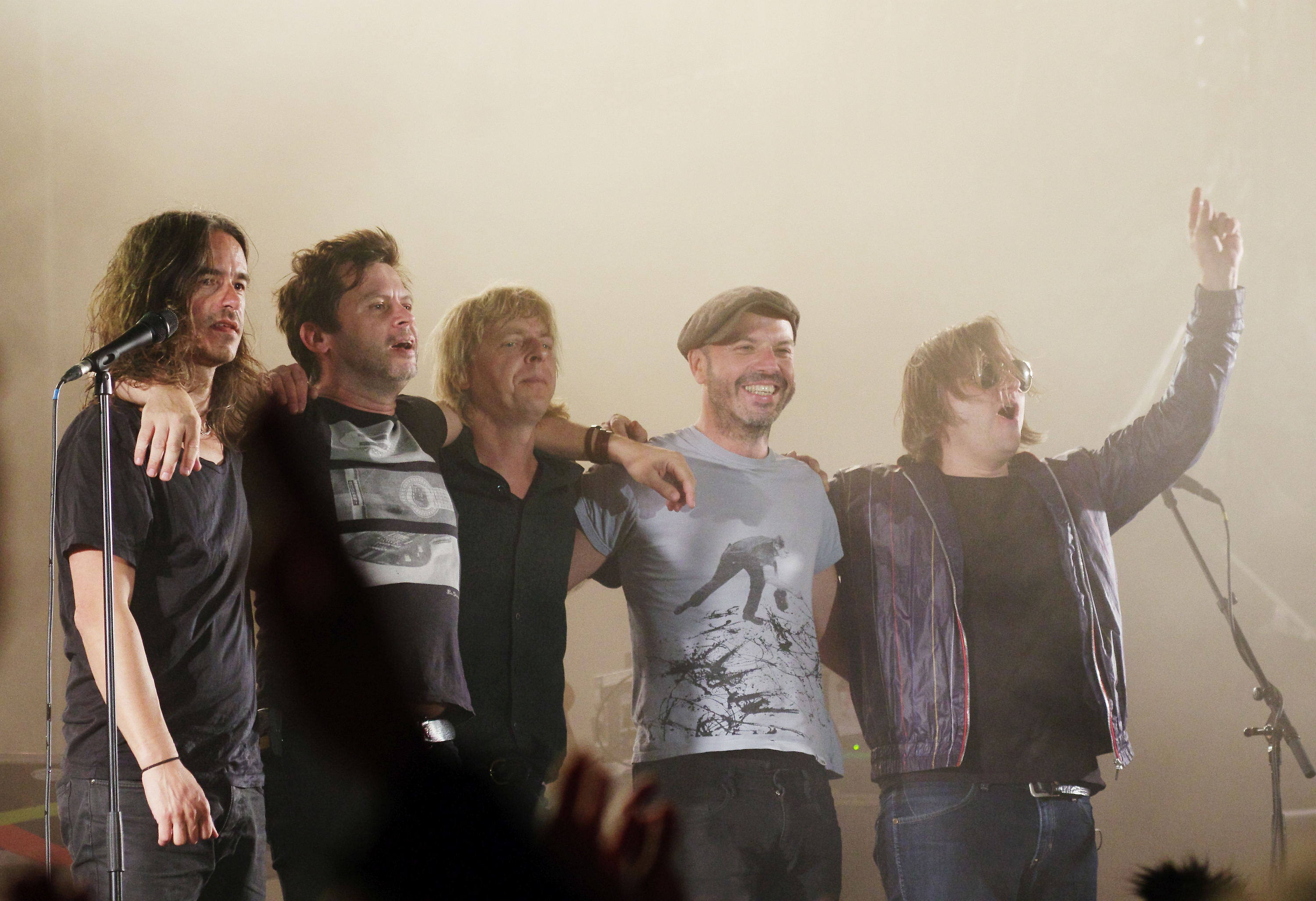 Jan Plewka mit Selig beim Jübek Open Air 2013.